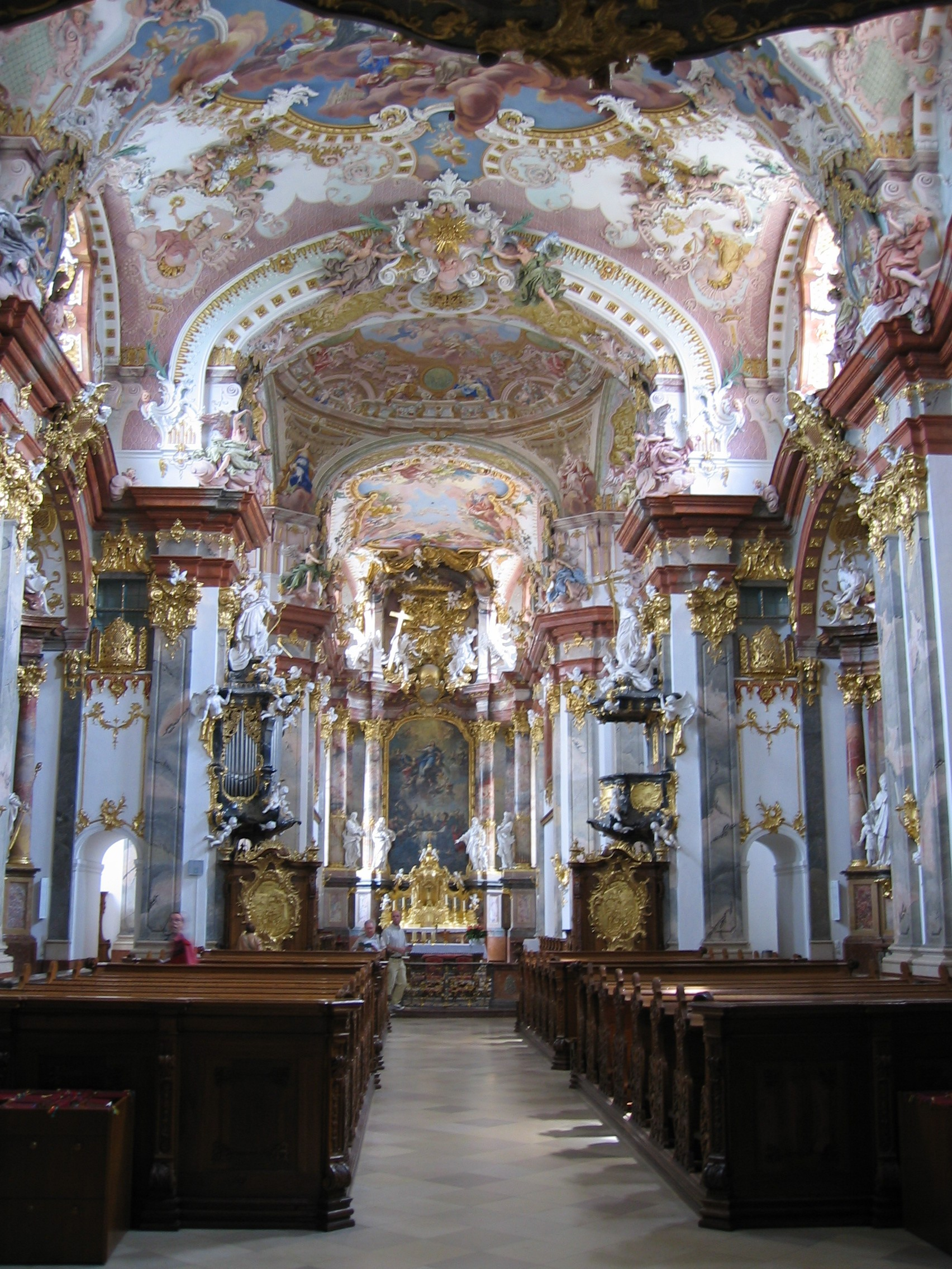 Stift Wilhering: Stiftskirche, Innenraum. Wilhering, Oberösterreich, Österreich (Church in Wilhering, Austria)